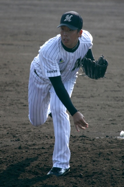 日本プロ野球 千葉ロッテマリーンズ 南昌輝 投手